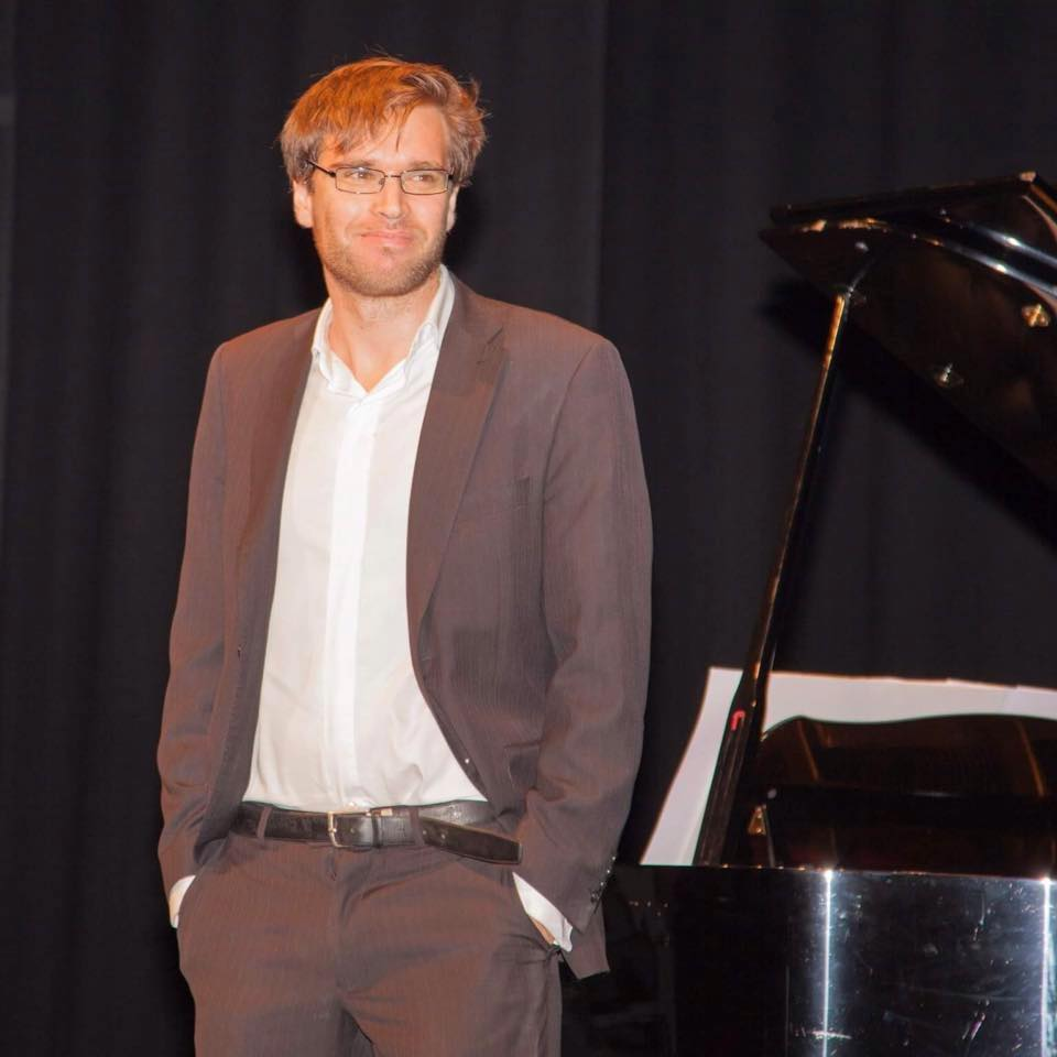 pianista clásico